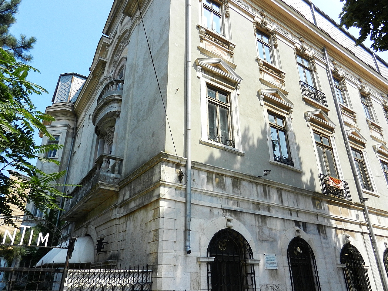 Hotel "Intim"